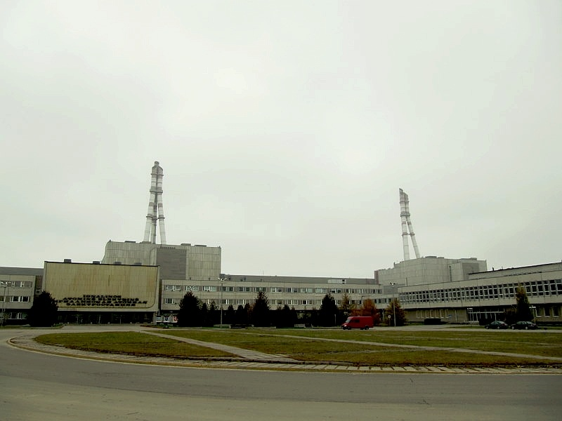 De Ignalina centrale is de grootste kerncentrale ter wereld. De centrale levert 1500 megawatt per unit, en voorziet in ongeveer driekwart van de Litouwse energiebehoefte. De centrale bestaat uit twee kernreactoren van het type RBMK. Een oudere versie van dit type was ook in gebruik in de verongelukte kerncentrale van Tsjernobyl. De reactoren in Ignalina zijn naar aanleiding van deze ramp ingrijpend gemoderniseerd.